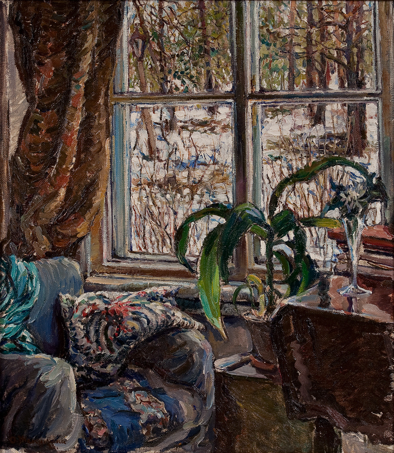 "Окно", 1926 год. Работа Ольги Жекулиной